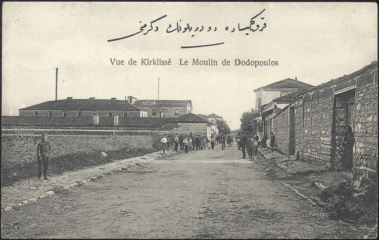 Лозенград, османска пощенска картичка